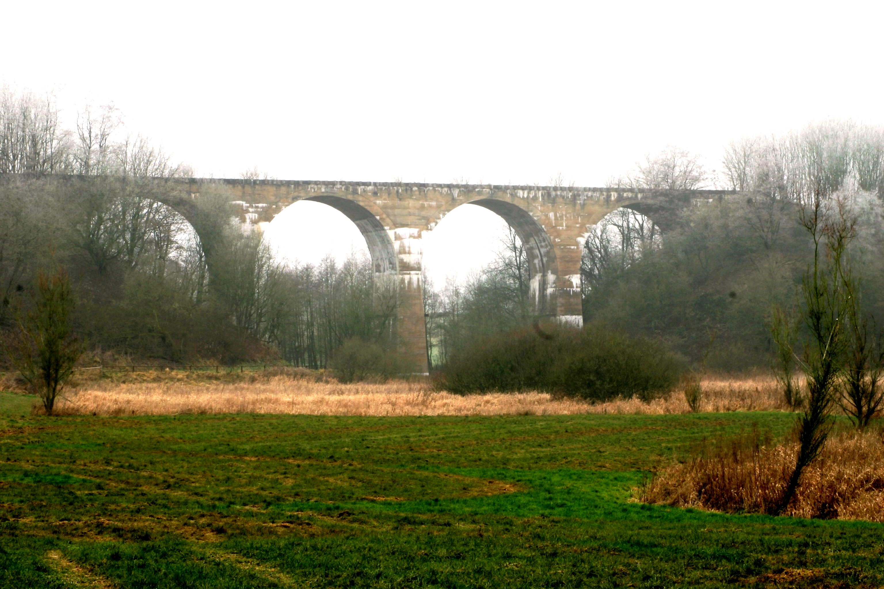 Bréck op der Streck Gouvy - St.Vith Bei Weisten iwwer dem Mittelbach.